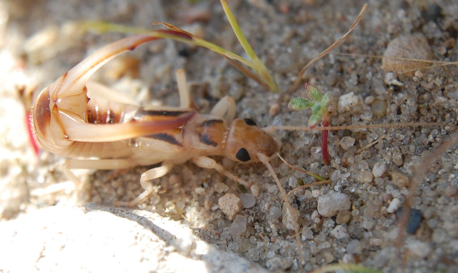 Labidura riparia, male, threatening